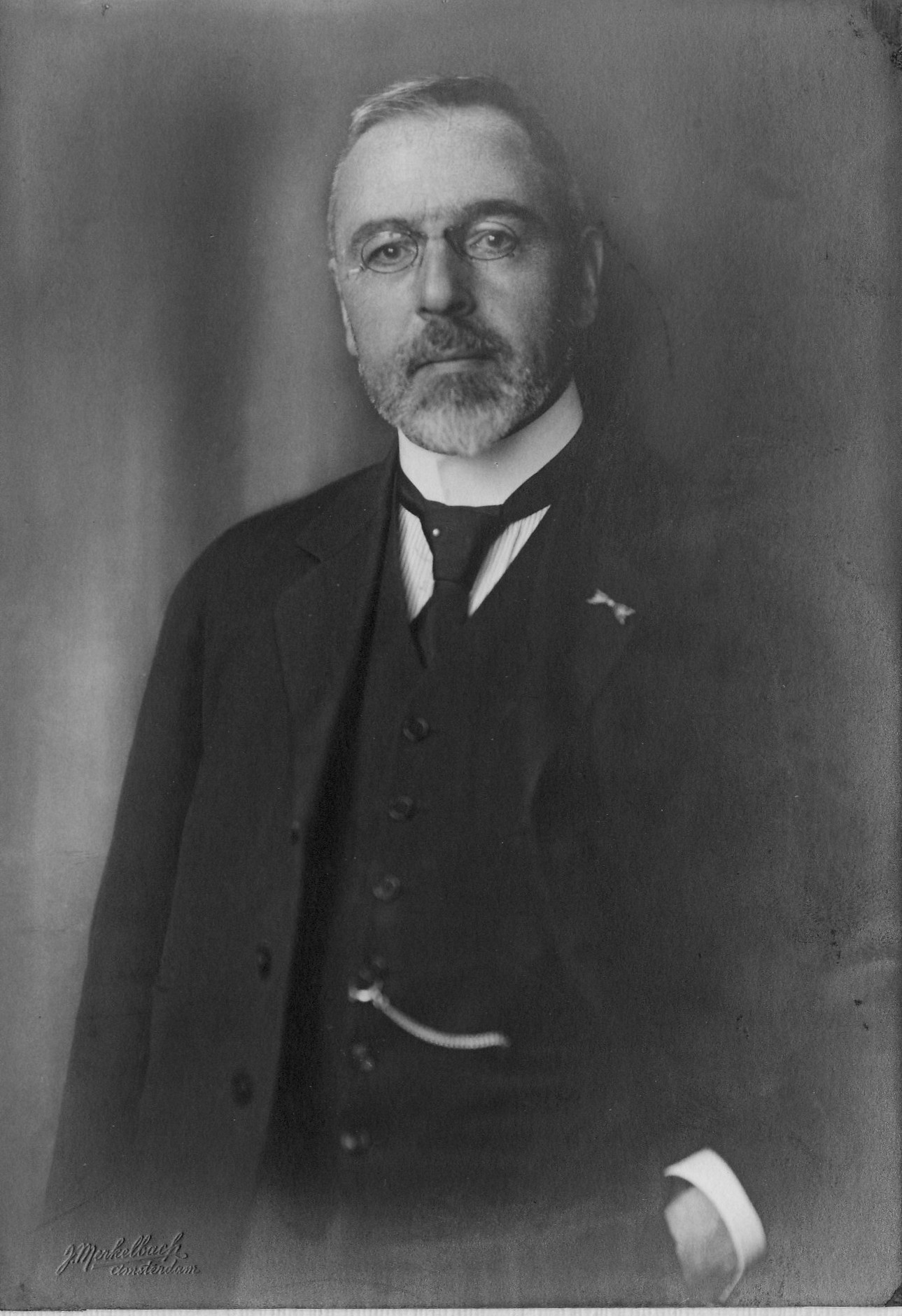 Mr. J. Kruseman 1867-1949.President van het Amsterdams Gerechtshof.